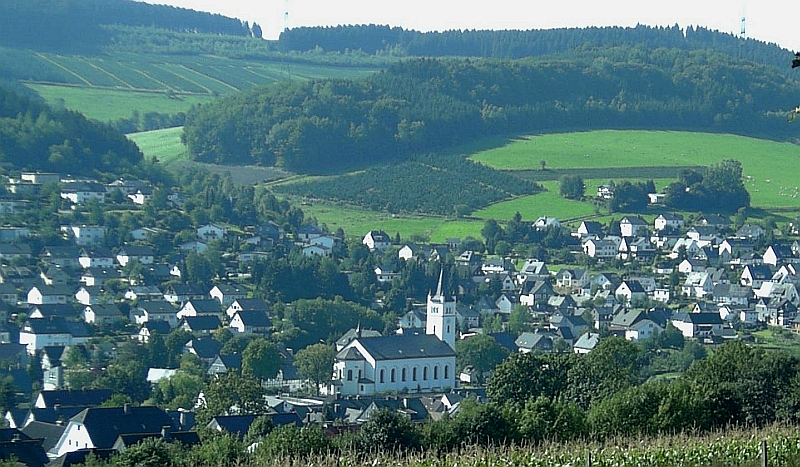 Velmede, Gemeine Bestwig, Germany.